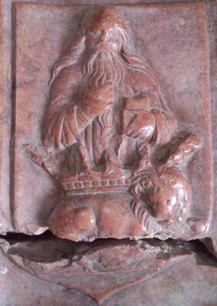 A Pálóci család címere Pálóci Mihály (1519†) és Pálóci Antal (1526†) síremlékéről.